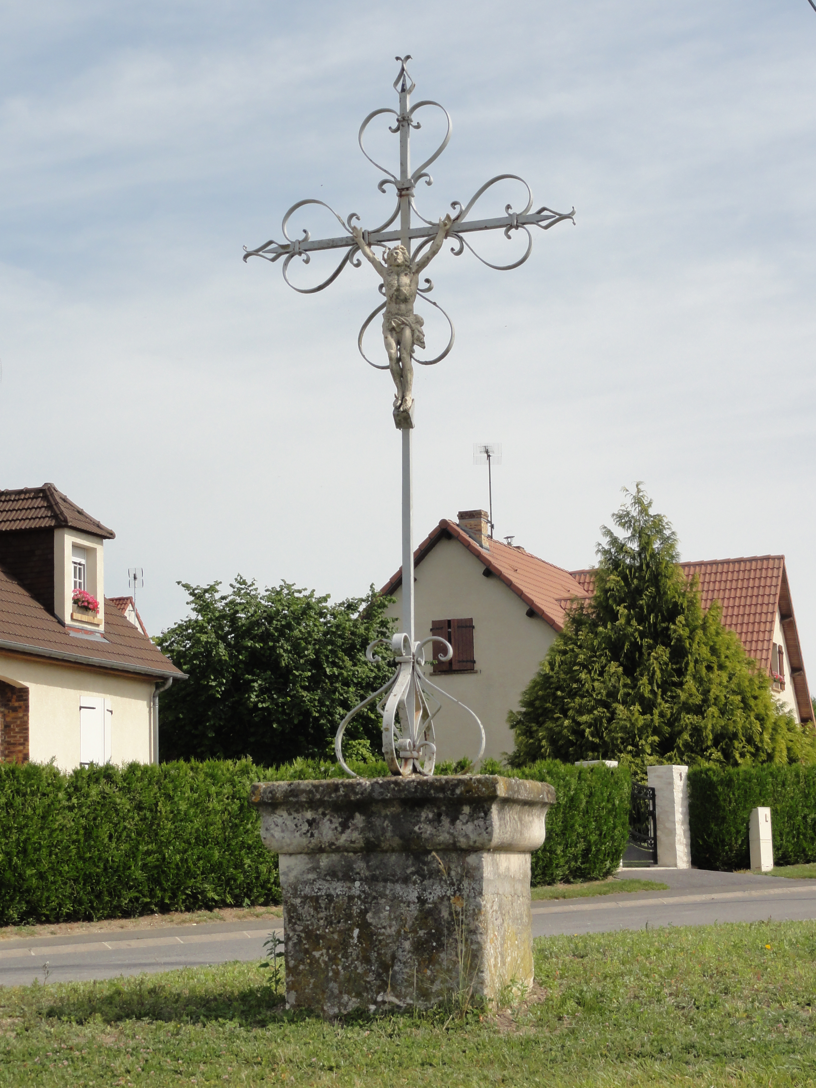 Boncourt (Aisne) croix de chemin